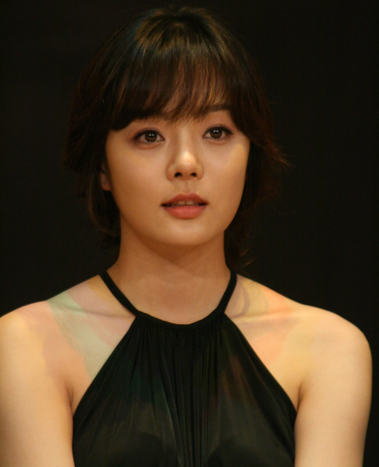 강적들 제작발표회